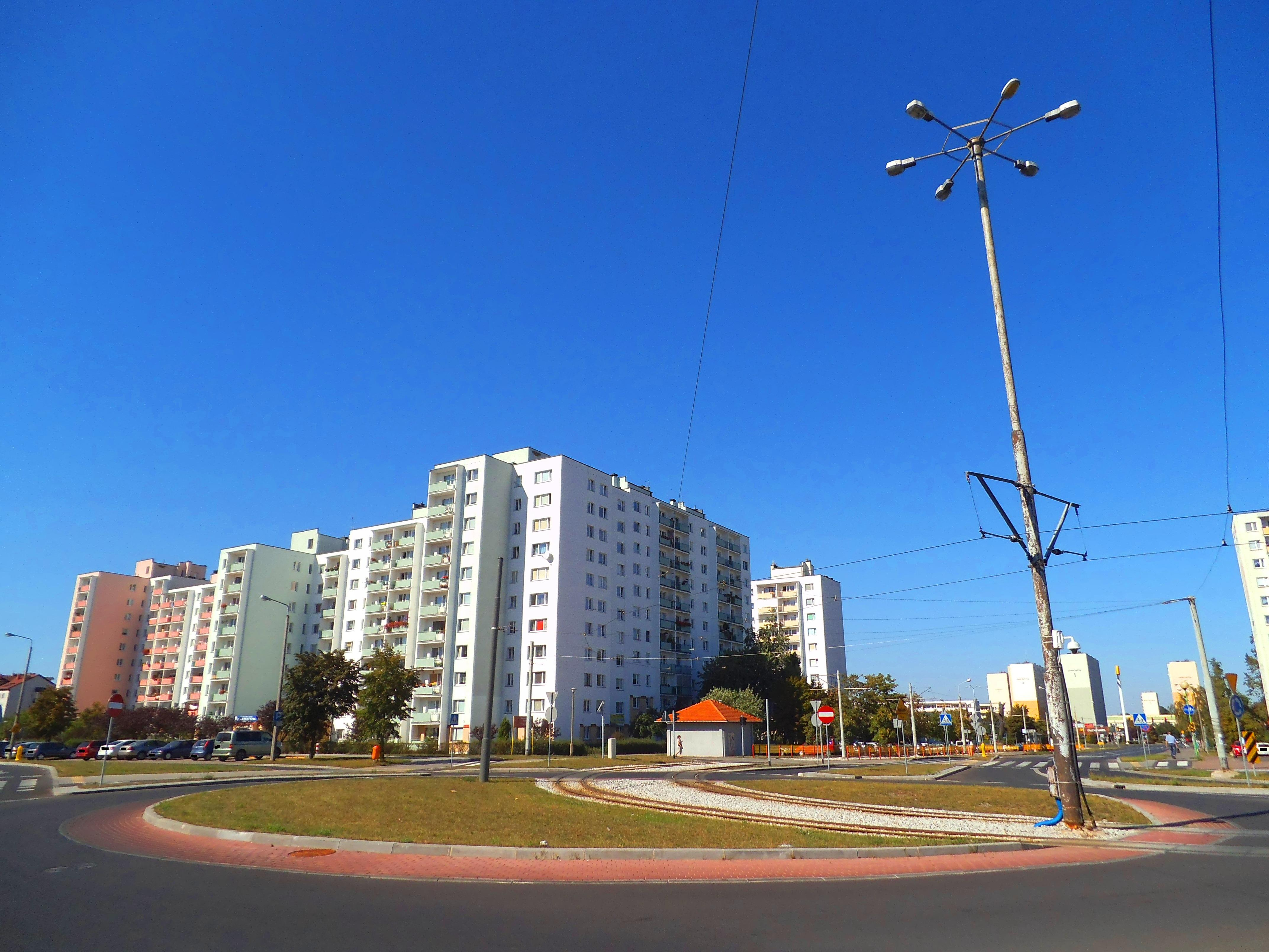 Rondo im. Stefana Michałka w Toruniu